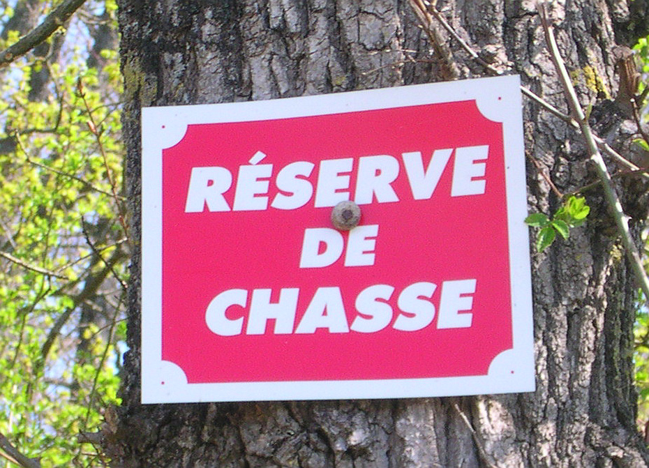 Panneau indiquant la limite d'une réserve de chasse en France Auteur/Author Romary Avril/April 2006